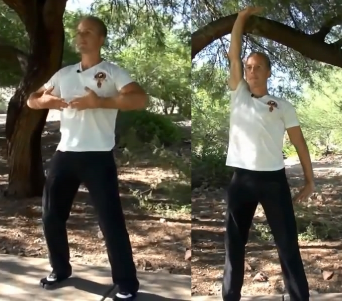 menyanggah tangan